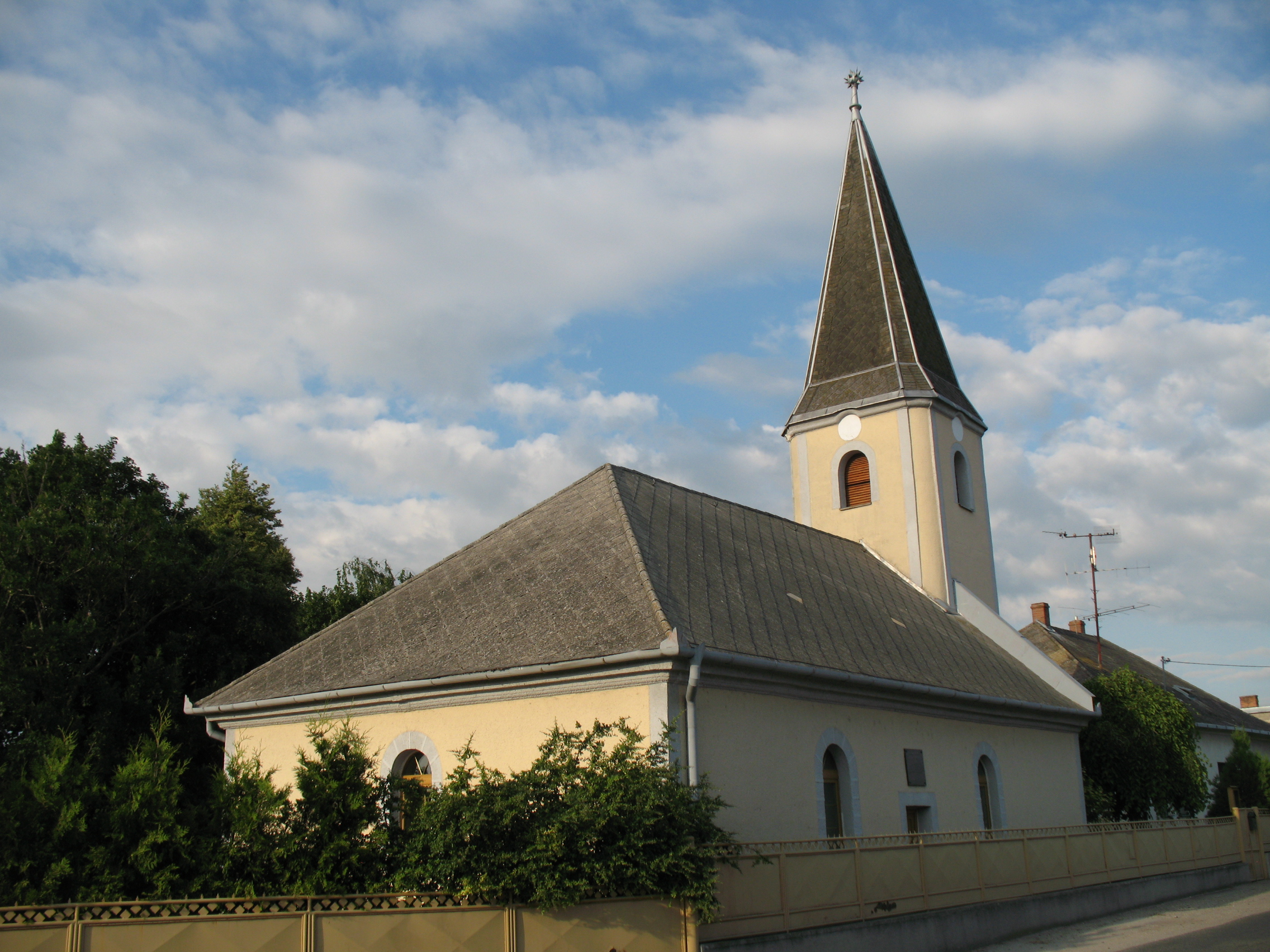 Benkepatony